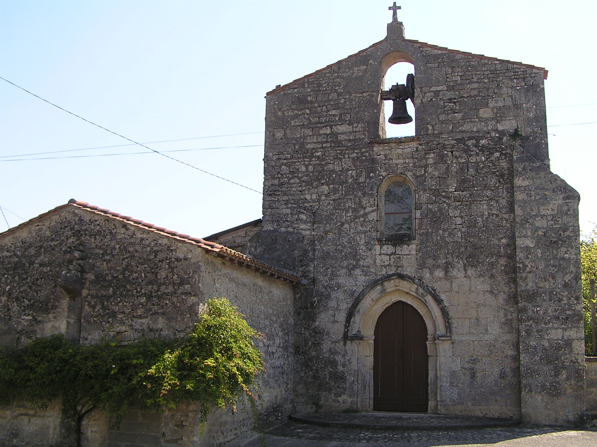 église de Saint-Amant-de-Nouère